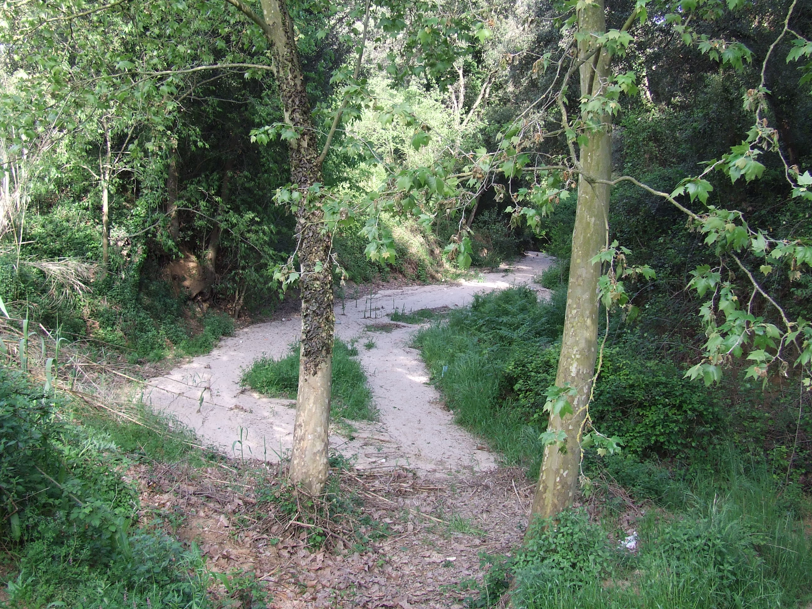 El torrent del Salt de la Núvia (Bigues, Bigues i Riells, Vallès Oriental)